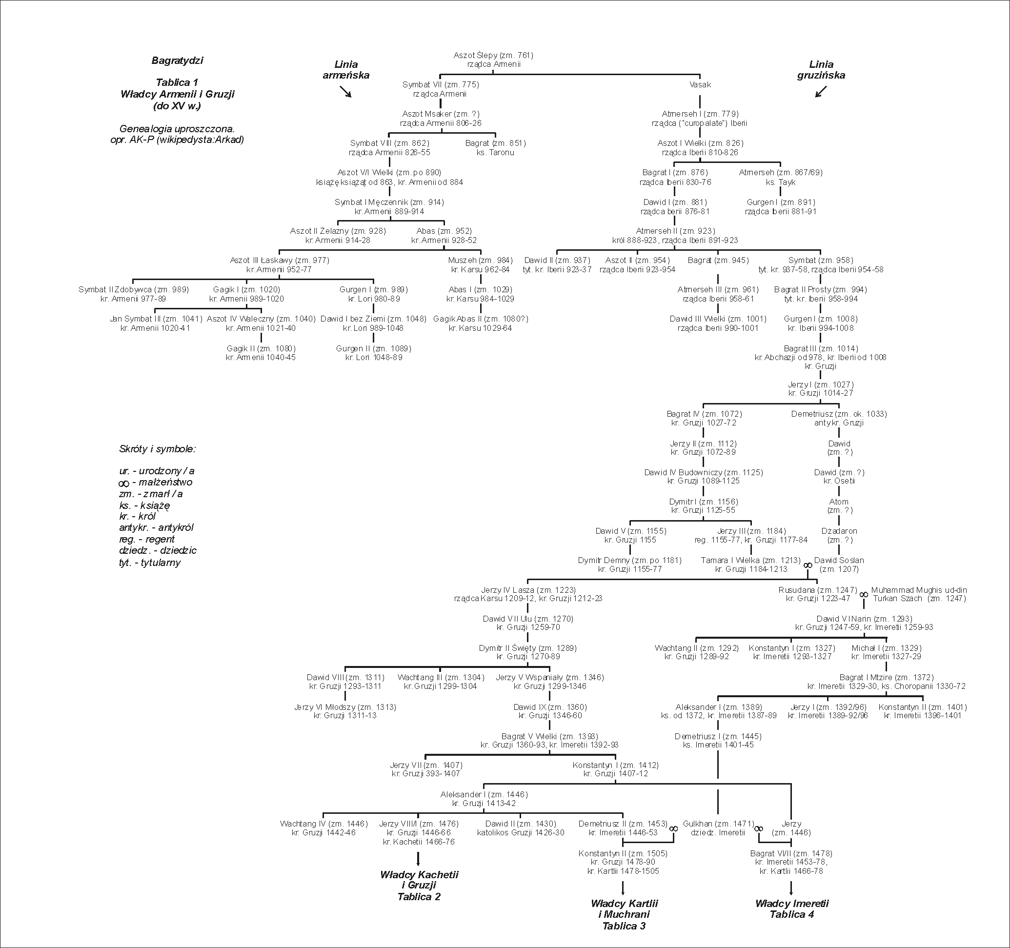 Genealogia uproszczona Bagratydów do XV w.